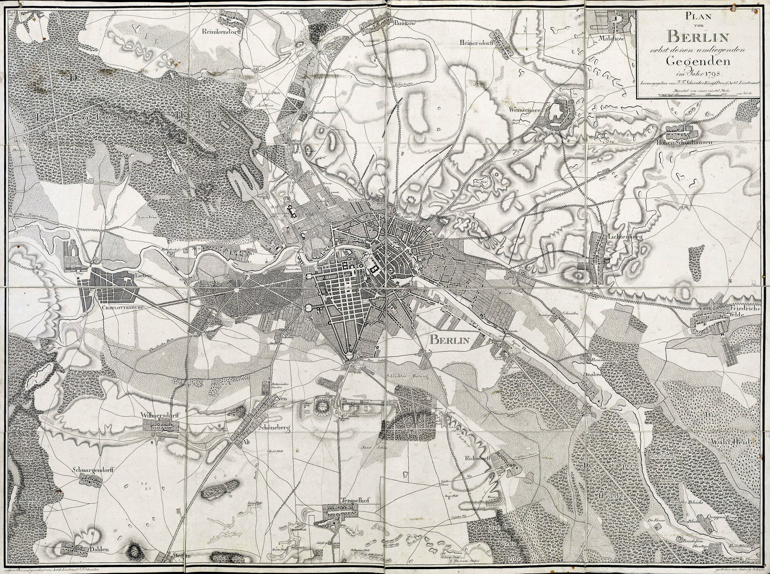 Der Titel steht 9-zeilig oben rechts in einem Rahmen zusammen mit einer Maßstabsleiste über 2500 Schritt. Im Plan rechts oben (neben Heinersdorf) ein Orientierungskreuz. Der Plan reicht westlich von Grunewald bis östlich nach Friedrichsfelde und südlich von Steglitz bis nördlich nach Malchow.